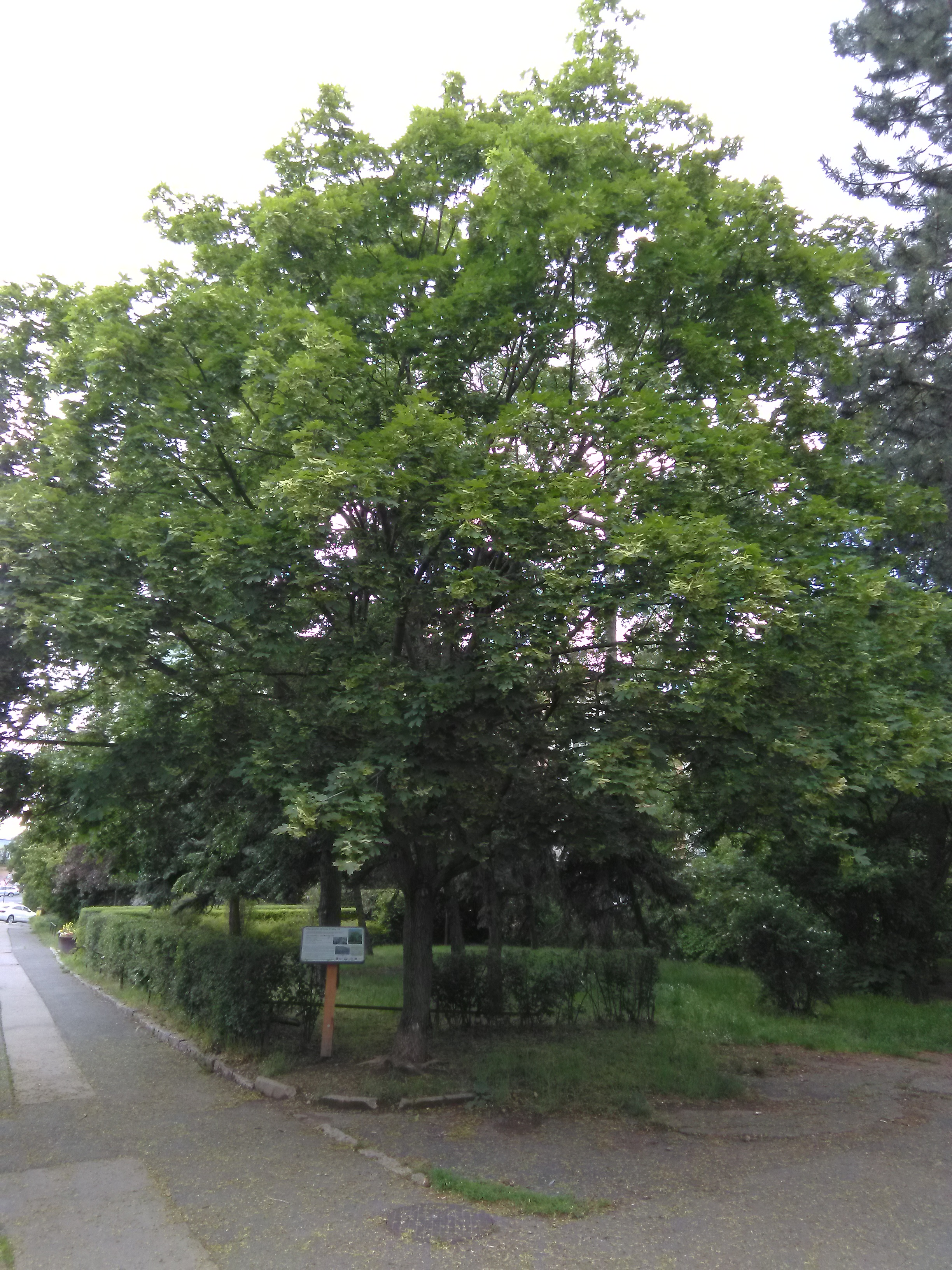 Lípa malolistá (Tilia cordata). Praha 10 - Strašnice, ulice Mukařovská. Vysazena 28 října 1968 na památku 50. výročí vzniku Československé republiky. Významný strom, evidenční číslo MHMP: 81, v databázi od roku 2019.